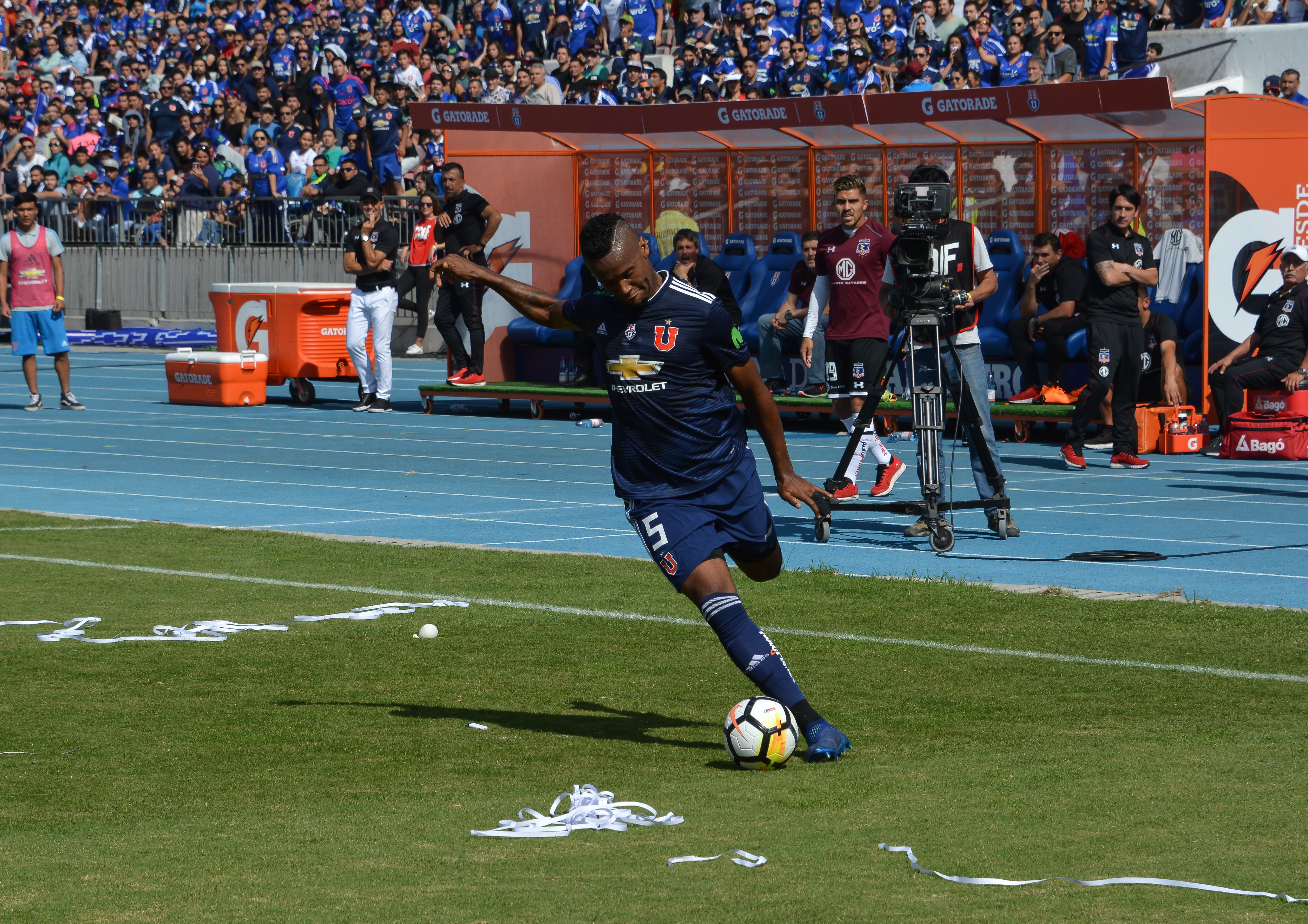 Universidad de Chile v Colo-Colo, Estadio Nacional, Santiago, Chile.